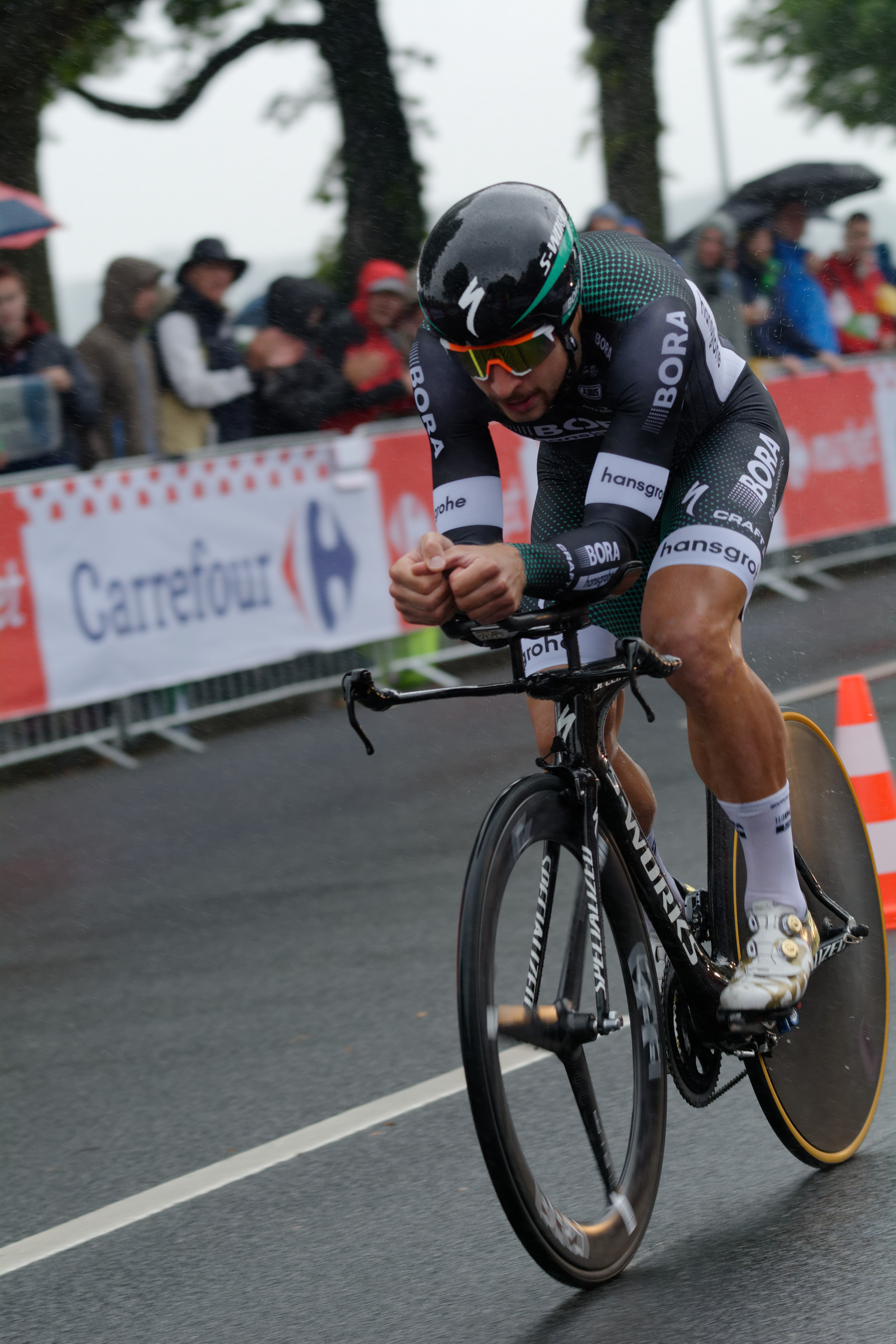 Tour de France 2017 Stage 1 Duesseldolf